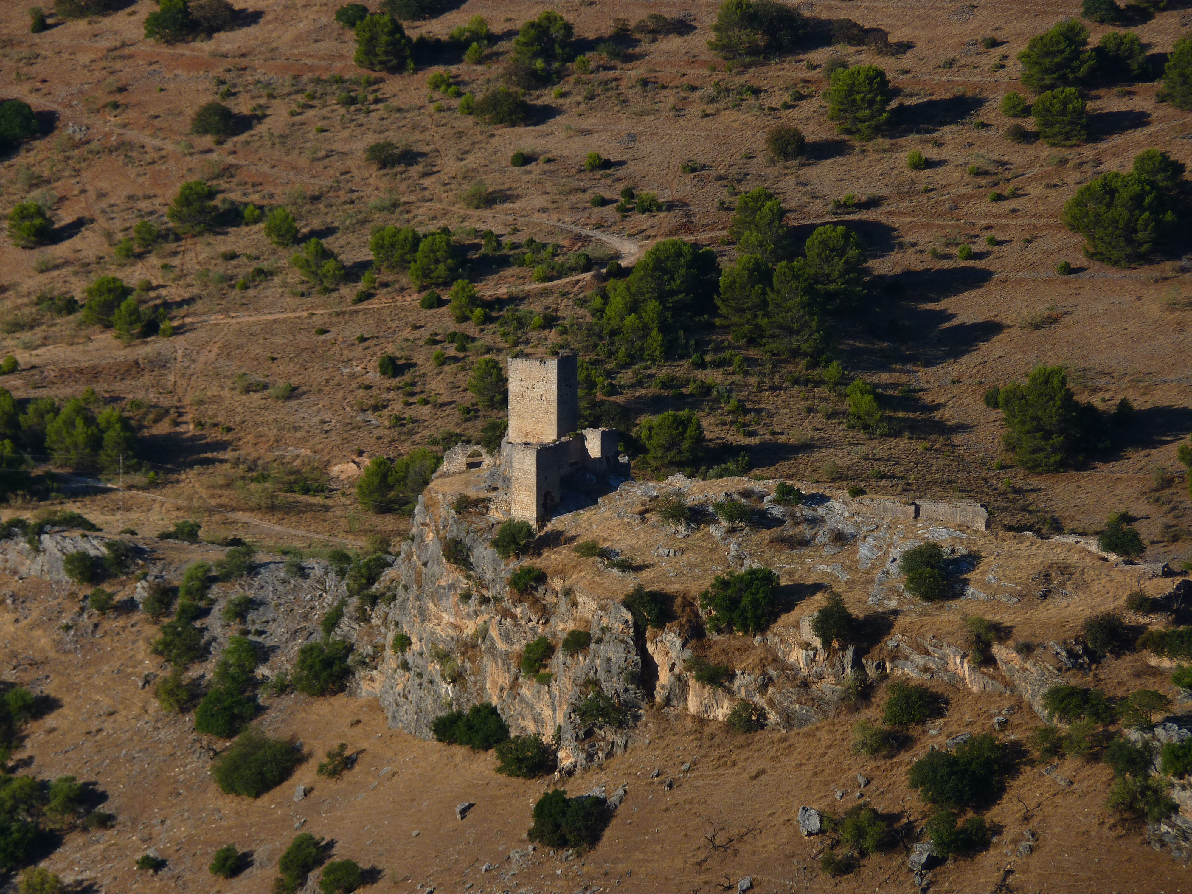 El Castillo de Otíñar desde las Alcandoras.